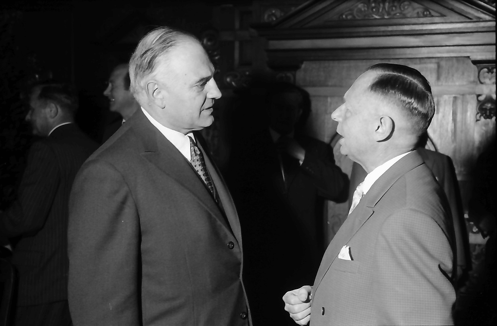 Besuch der Landesregierung in Freiburg 1957: Justizminister Wolfgang Haußmann, Oberbürgermeister Josef Brandel